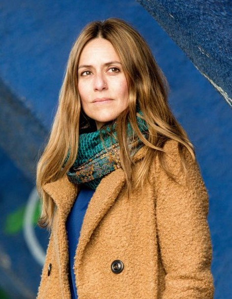 Itziar Ituño aktorea 2019an, Argia aldizkarirako elkarrizketan